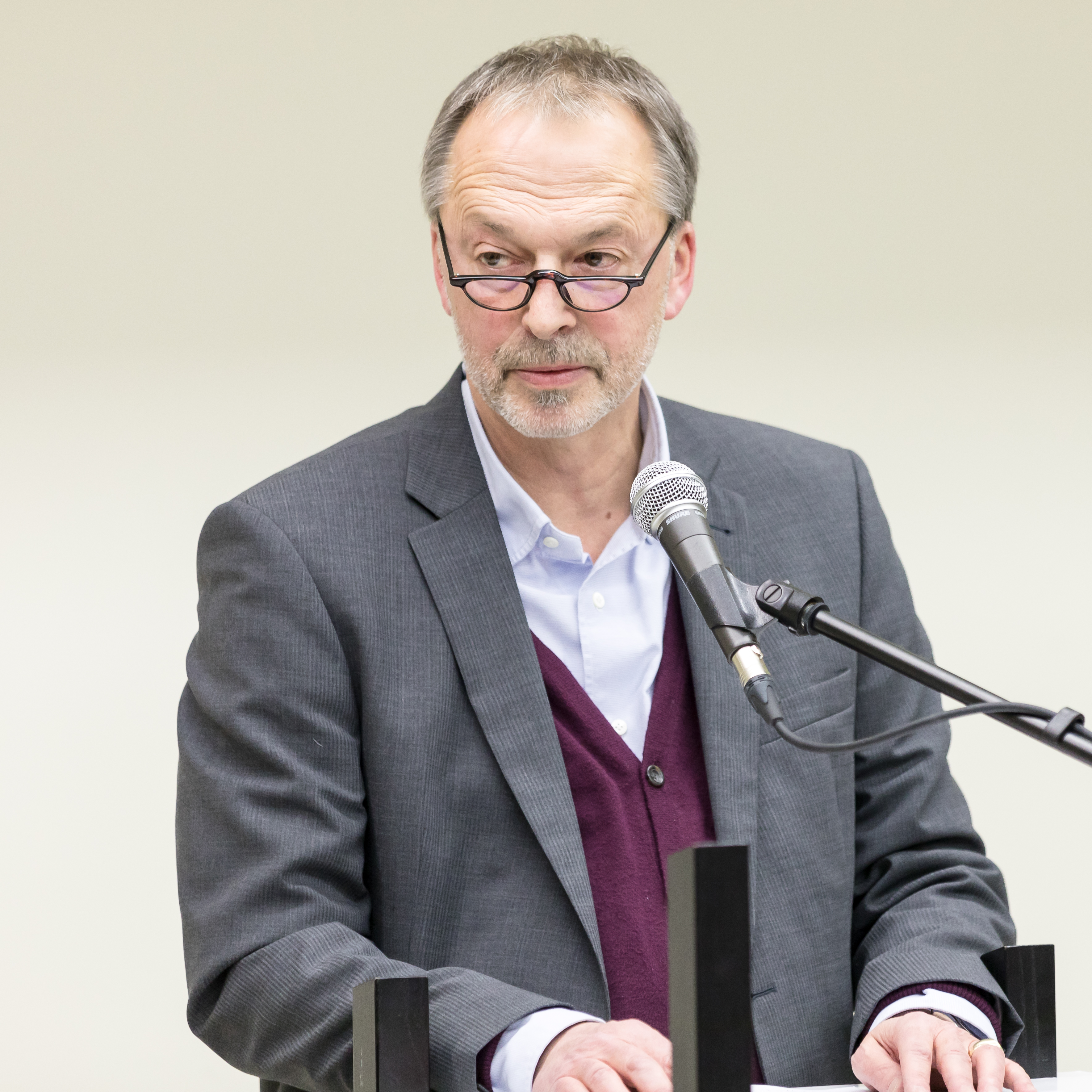 Ausstellungseröffnung „Trotzdem Alaaf!“ und „Im rechten Licht“ im Kölnischen Stadtmuseum Foto: Michael Euler-Schmidt, stellvertretender Museumsleiter, kuratierte die Ausstellung „Im rechten Licht“ der Kölner Künstlerin und Fotografin Karin Richert